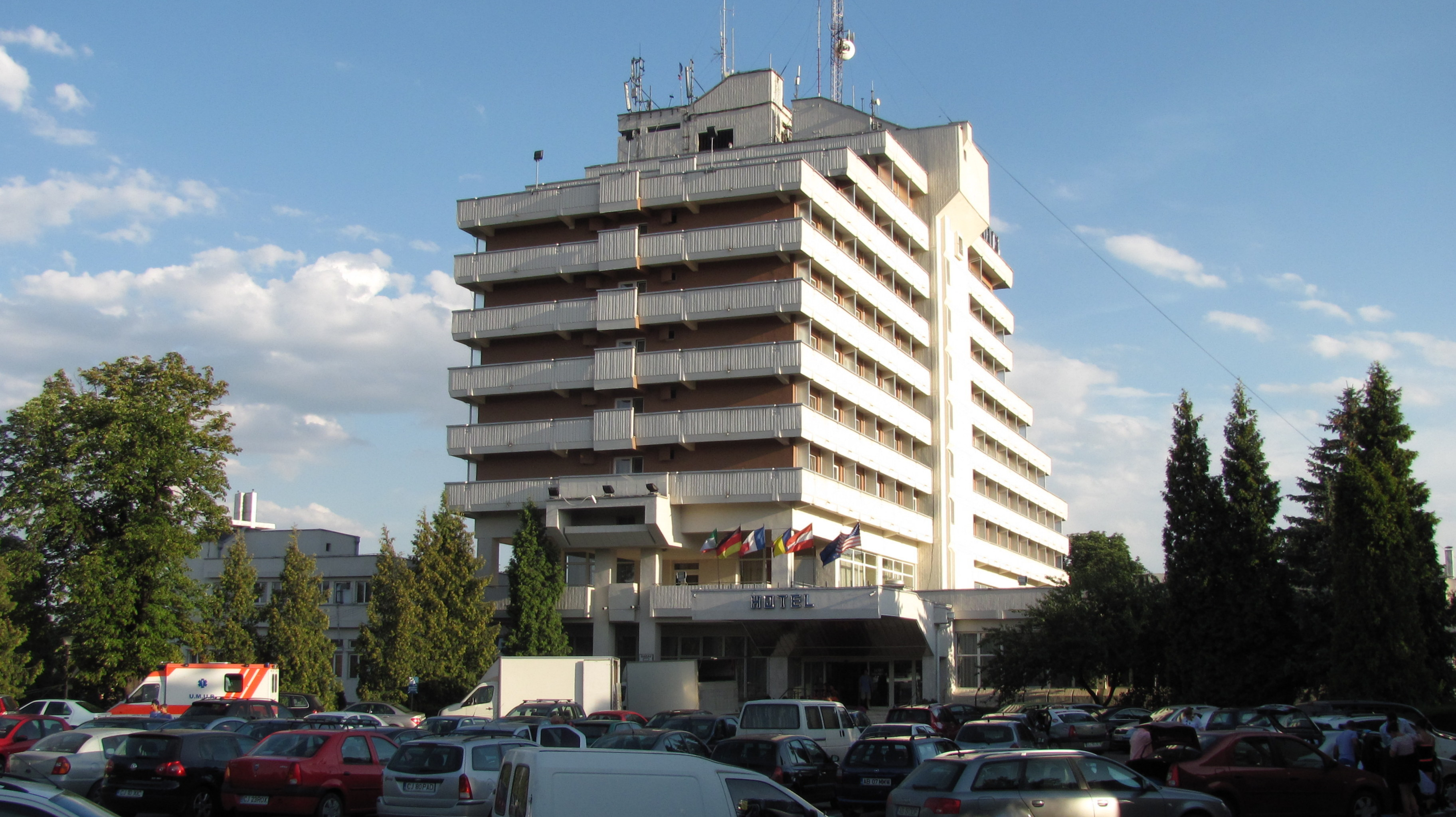 Cluj-Napoca - Cetățuia - Hotel Belvedere